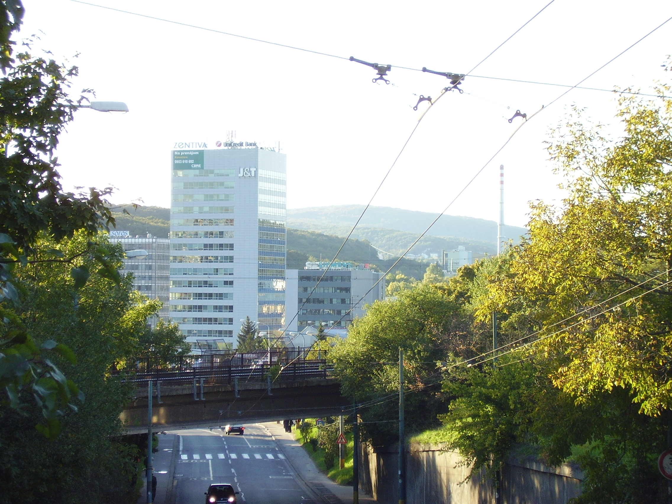 Pohľad na Patrónku z Kramárov.